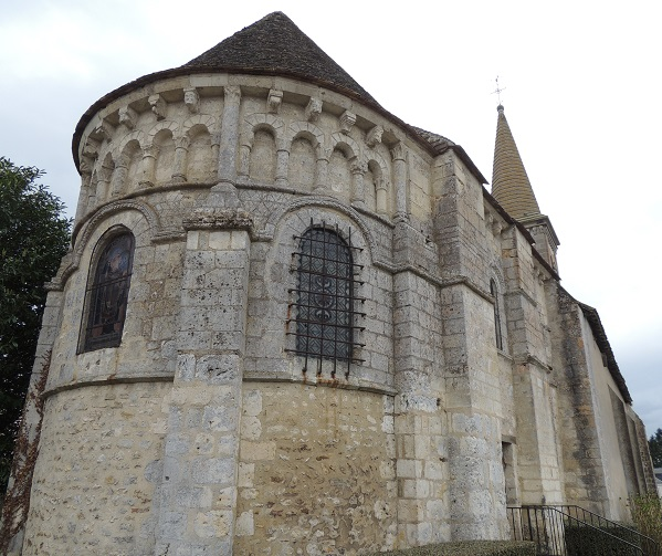 Église Saint-Martin de Lancé, magnifique chevet aux portraits sous le toit et aux colonnettes romanes tout autour de la partie haute du chevet au dessus des 2 fenêtres modestes avec vitraux et au second plan le clocher couvert en pierres